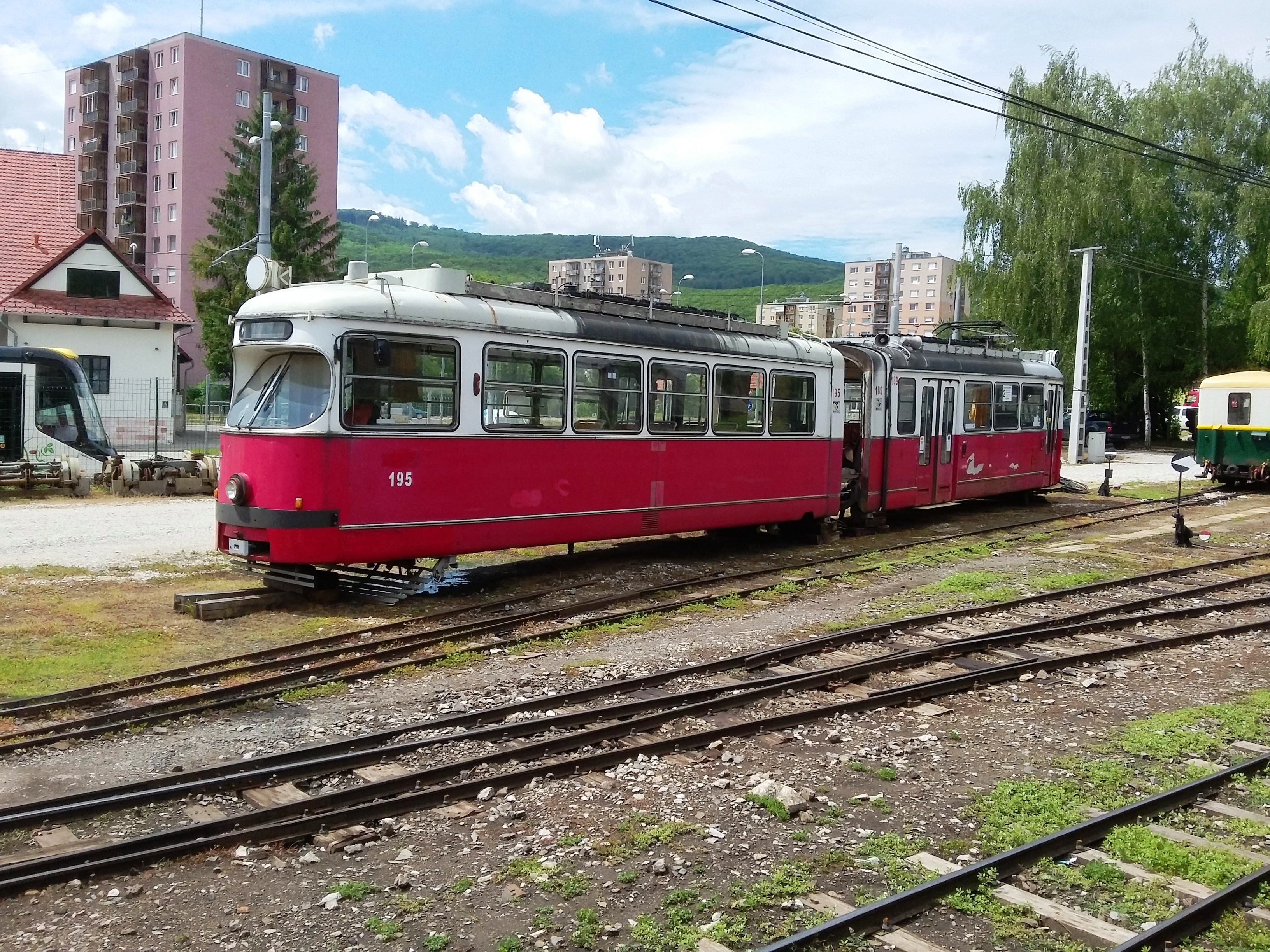 E1 típusú villamos a Lillafüredi Állami Erdei Vasút telephelyén